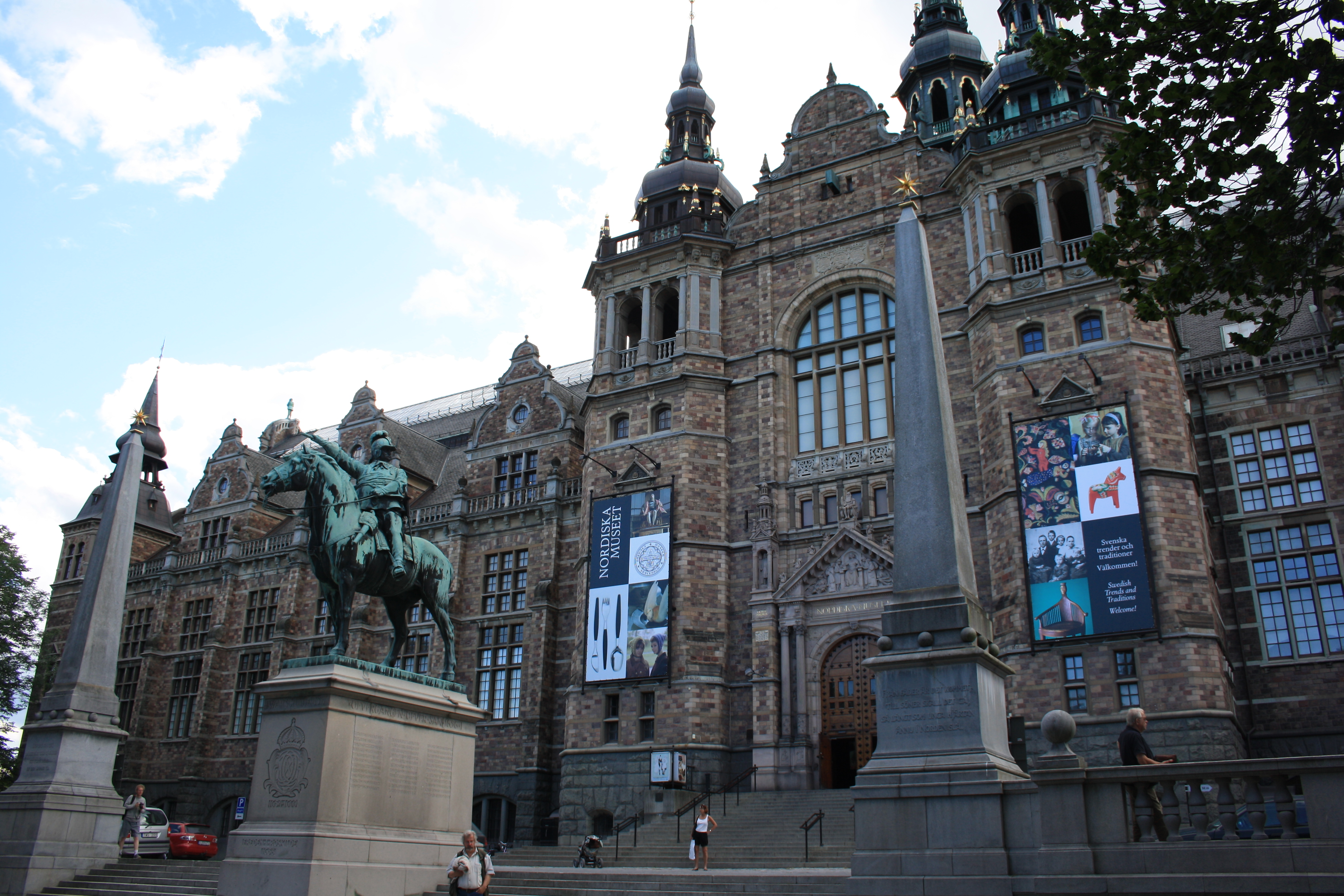 L'entrée du musée Nordique (Nordiska Museet) à Stockholm en Suède.